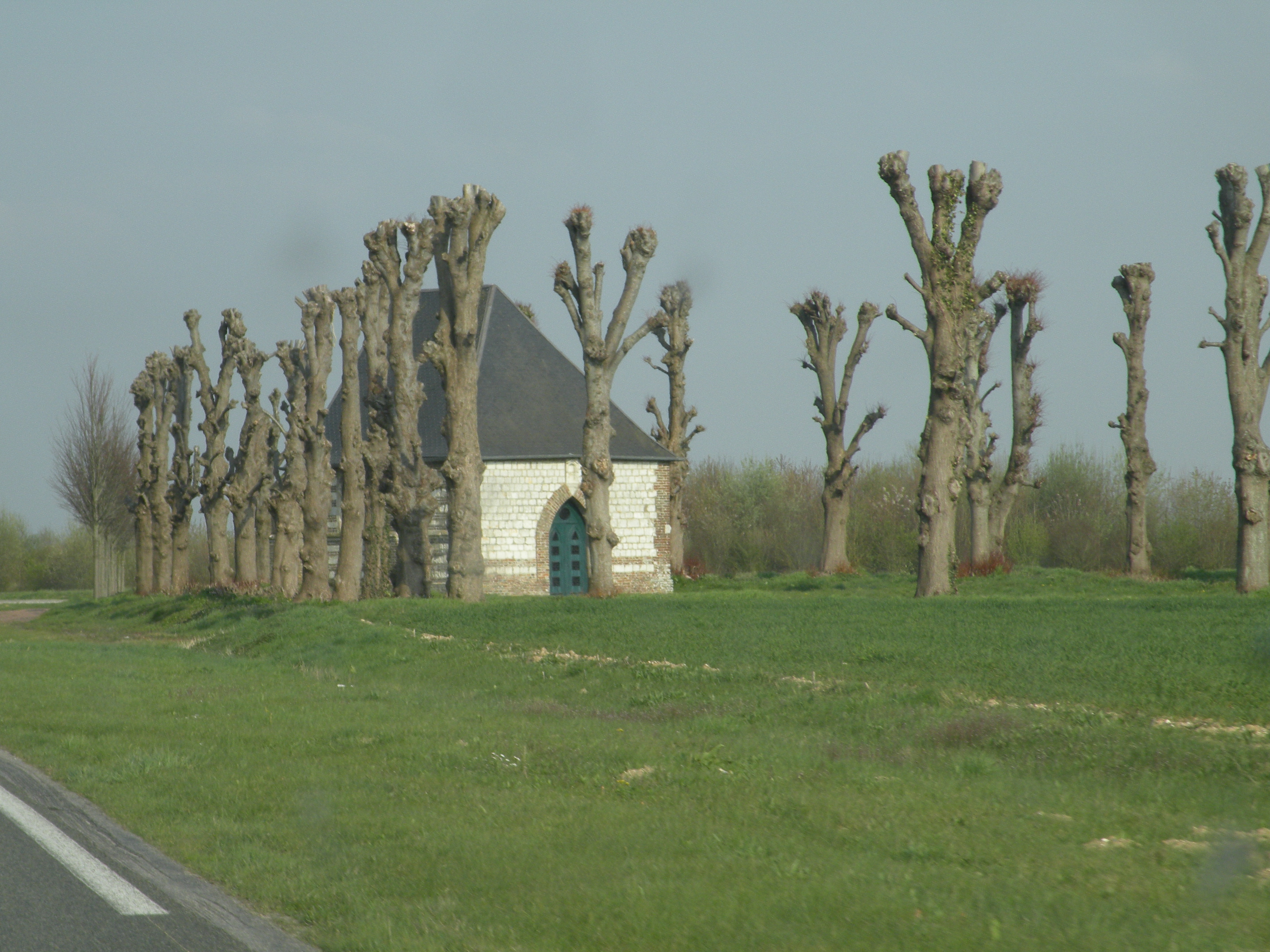 La chapelle Notre-Dame-de-Foy à Canchy.